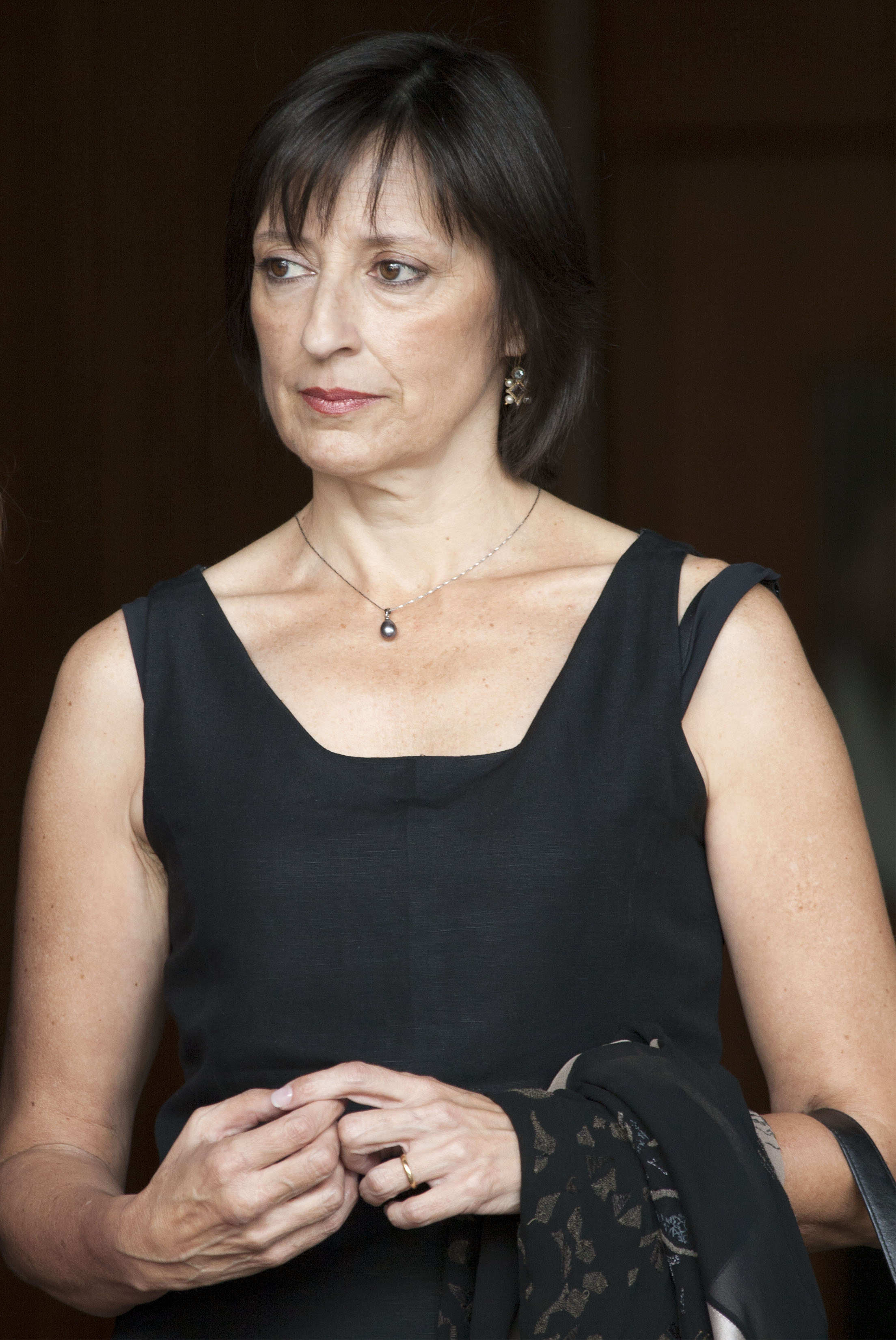 Sábado, 27 de Septiembre 2014. Se viste de gala la Orquesta Filarmónica de la Ciudad de México con los estrenos de las obras: Concierto para piano y orquesta de Maria Granillo y Altre lontananze de Ana Lara, bajo la dirección de Jose Arean y con el pianista Mauricio Nader y Gustavo Delgado en el Organo. EN FOTOGRAFÍA GUSTAVO DELGADO, ÓRGANO Foto: ABRIL CABRERA A. / Secretaria de Cultura